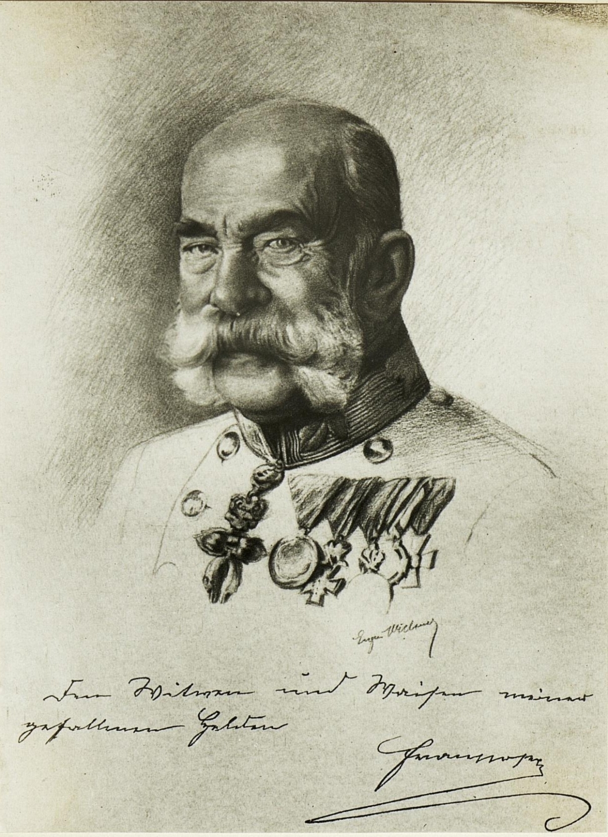 Sr.Majestät Kaiser Franz Josef I. (Reproduktion.)